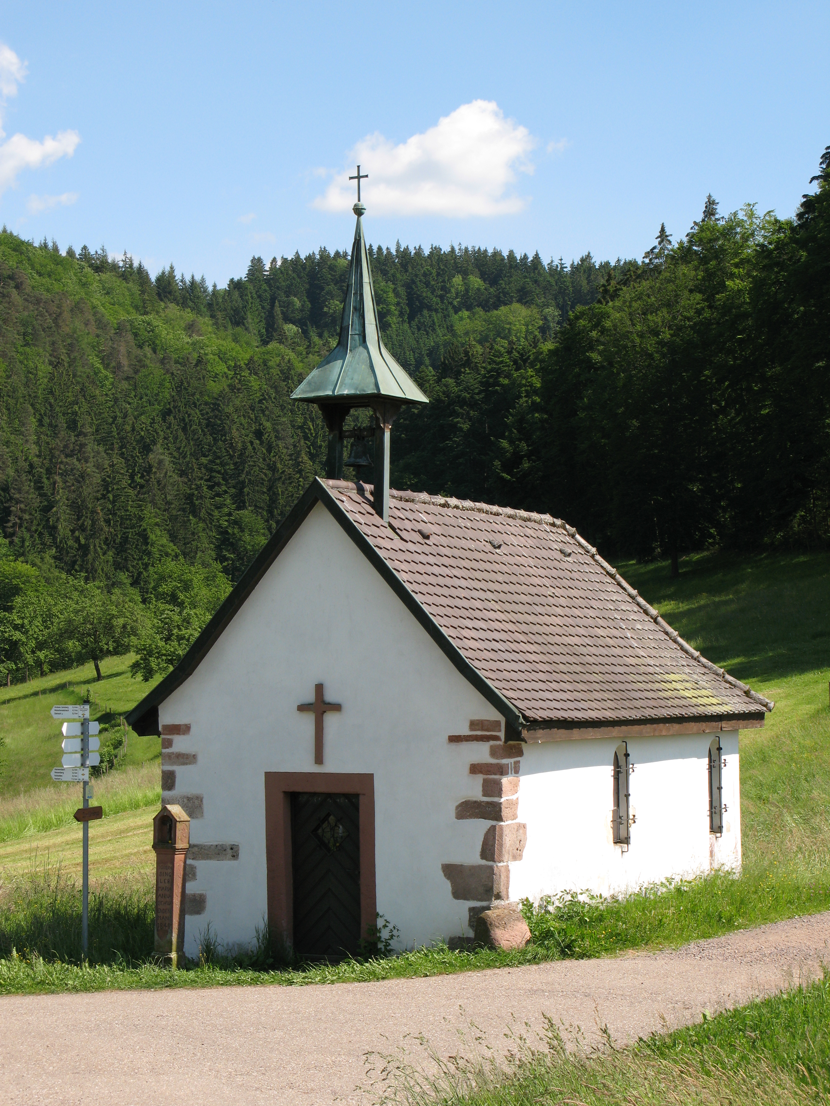 Die Robertskapelle am Kandelhöhenweg und dem Schwarzwald-Querweg Rottweil–Lahr im Schwarzwald.